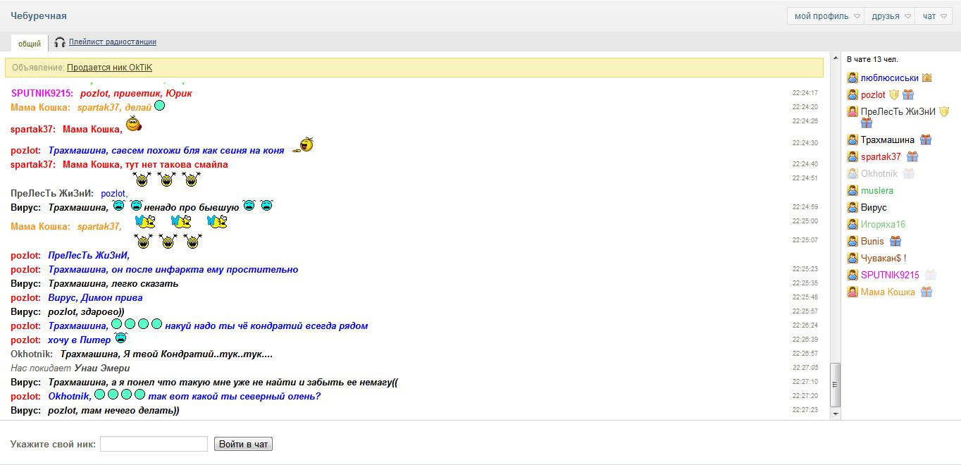 Скриншот чат-сервиса, в котором используются самые последние технологии.